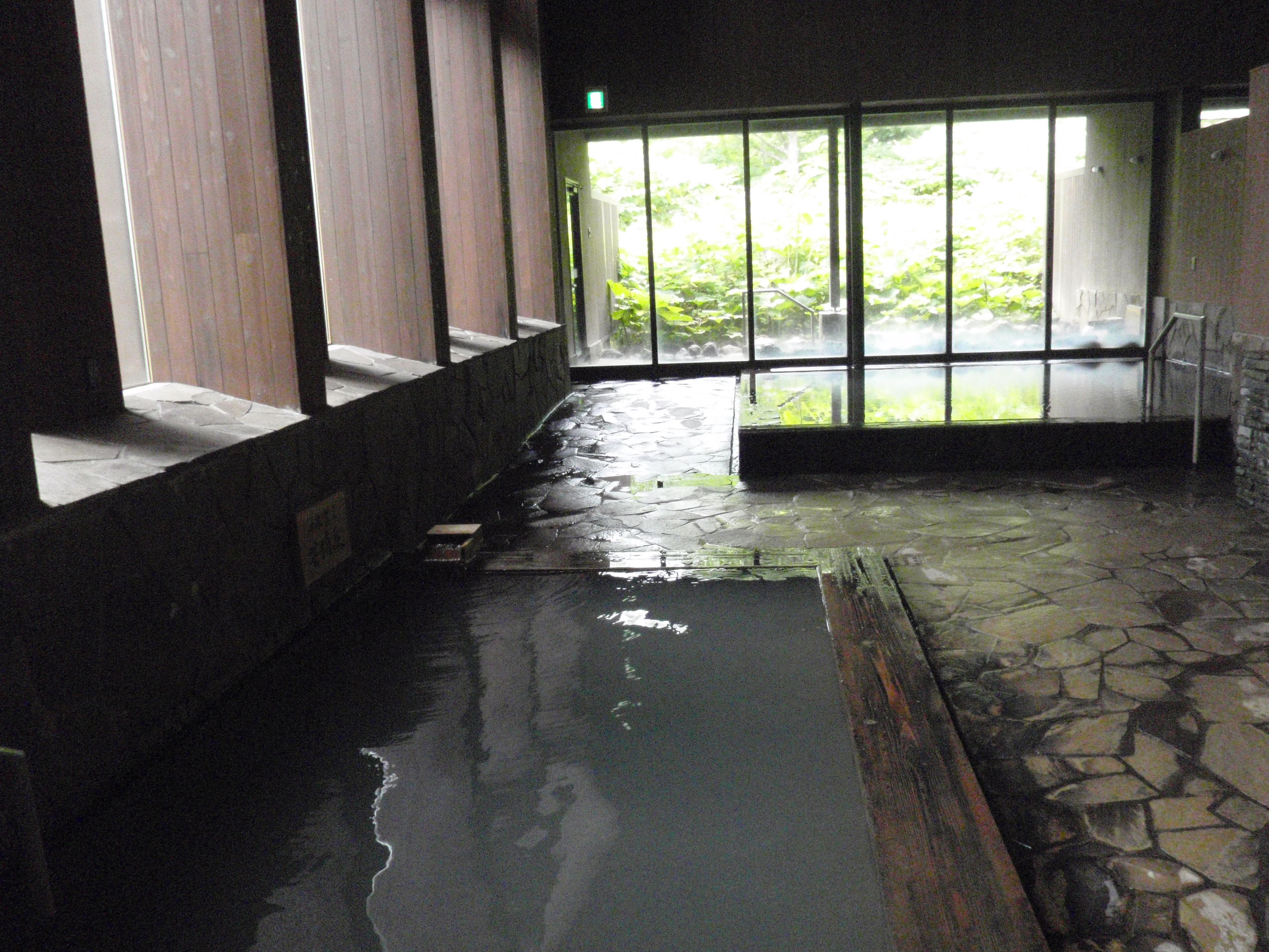 旭岳温泉、湧駒荘浴室